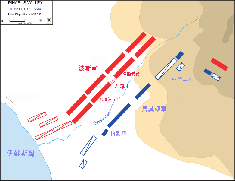 中文化